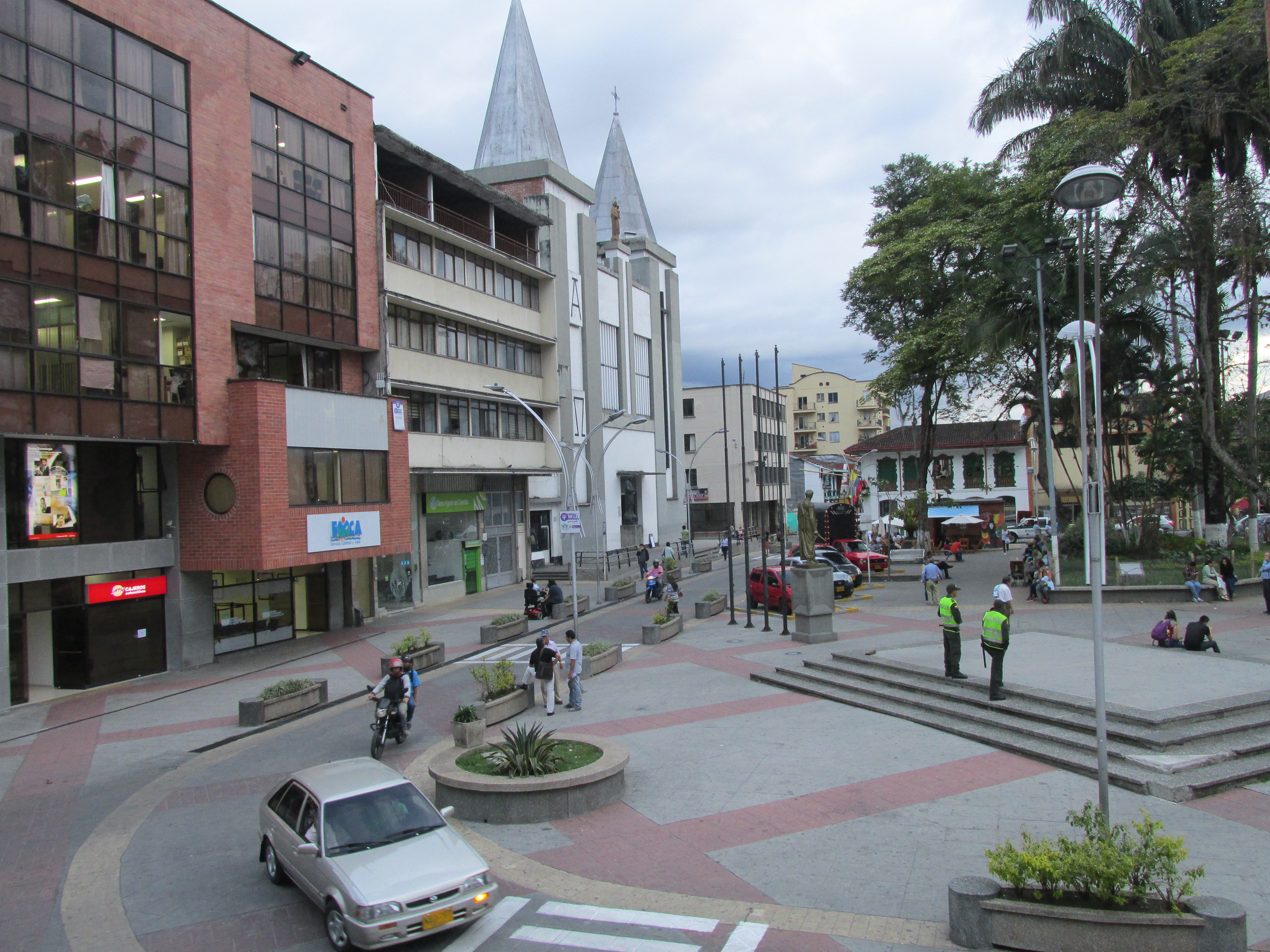 Plaza central de Calarcá, Quindío, Colombia